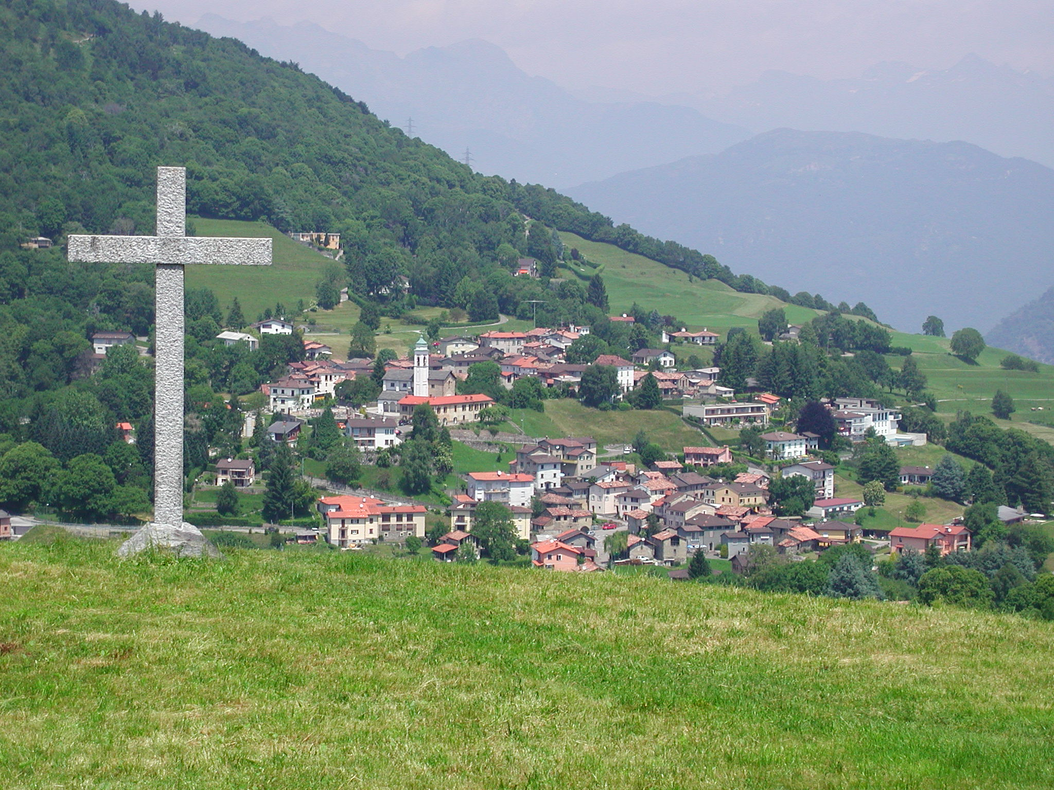 Arosio (Malcantone) Dorf, Blick vom Kreuz, Alpe Agra